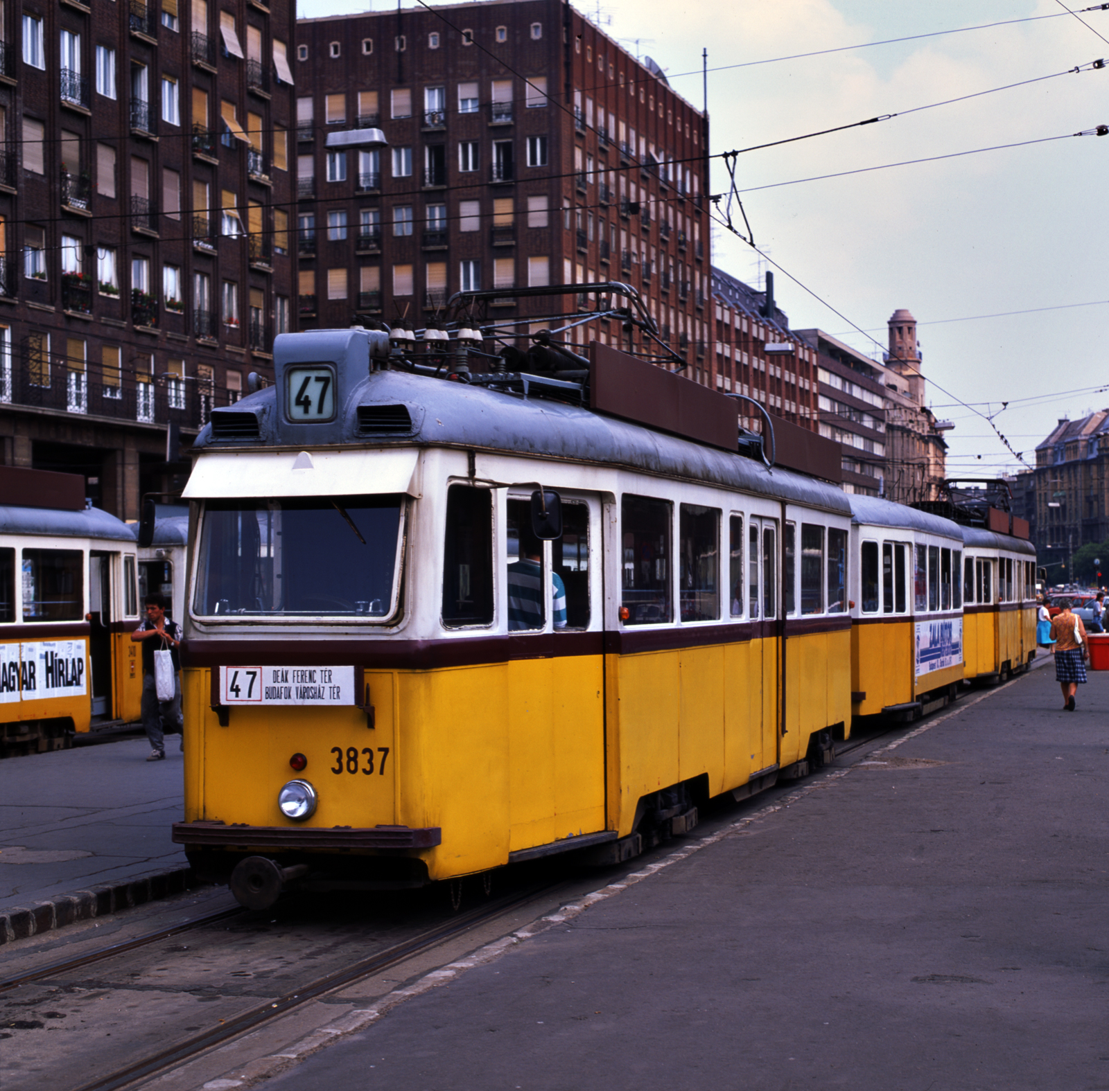 UV szerelvények a budapesti Deák Ferenc téren